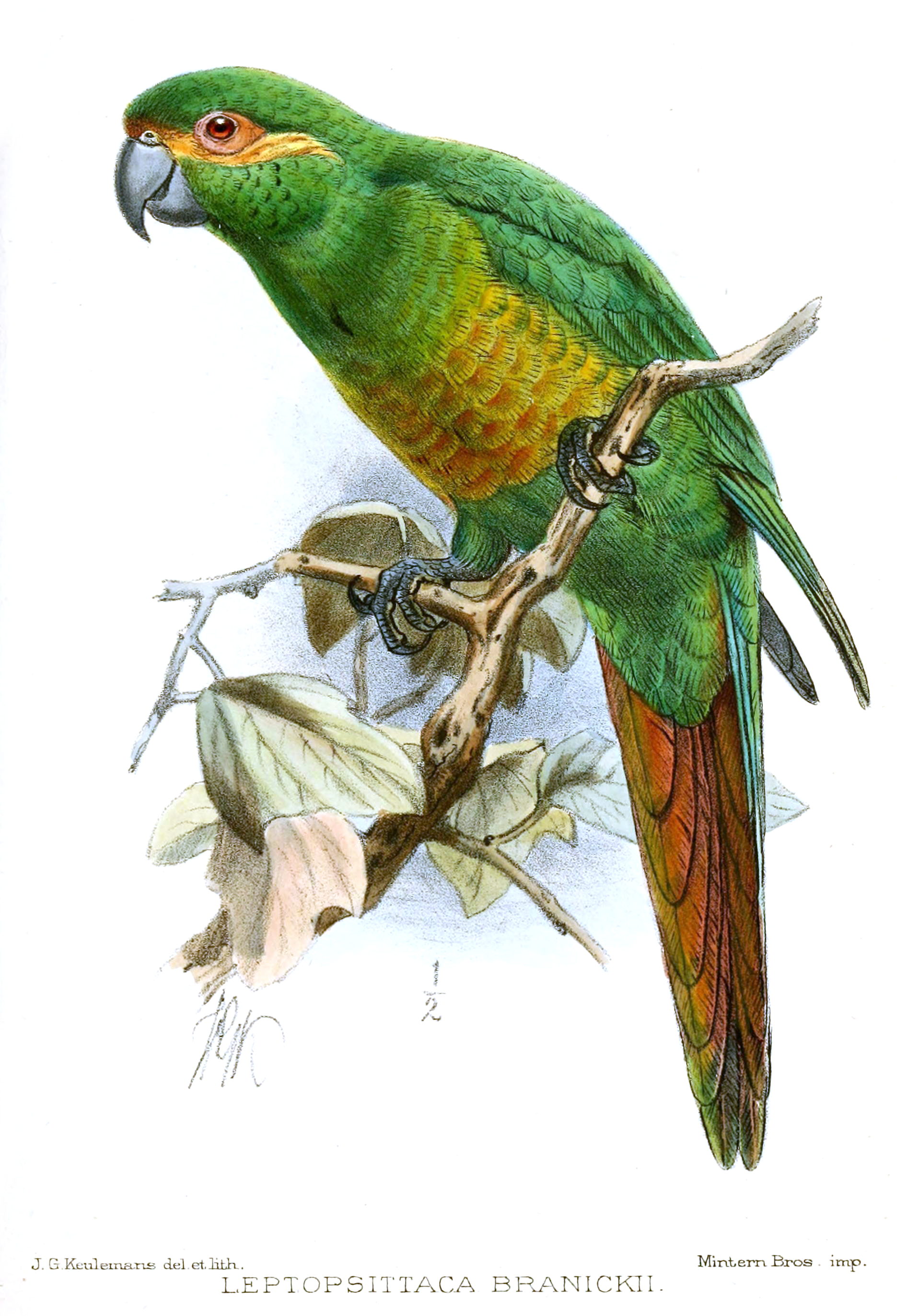 Leptopsittaca branickii